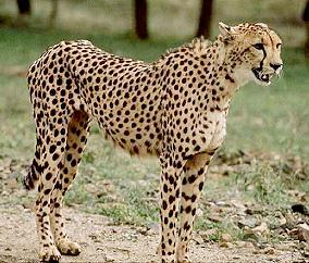 Este es un ejemplar de guepardo asiático